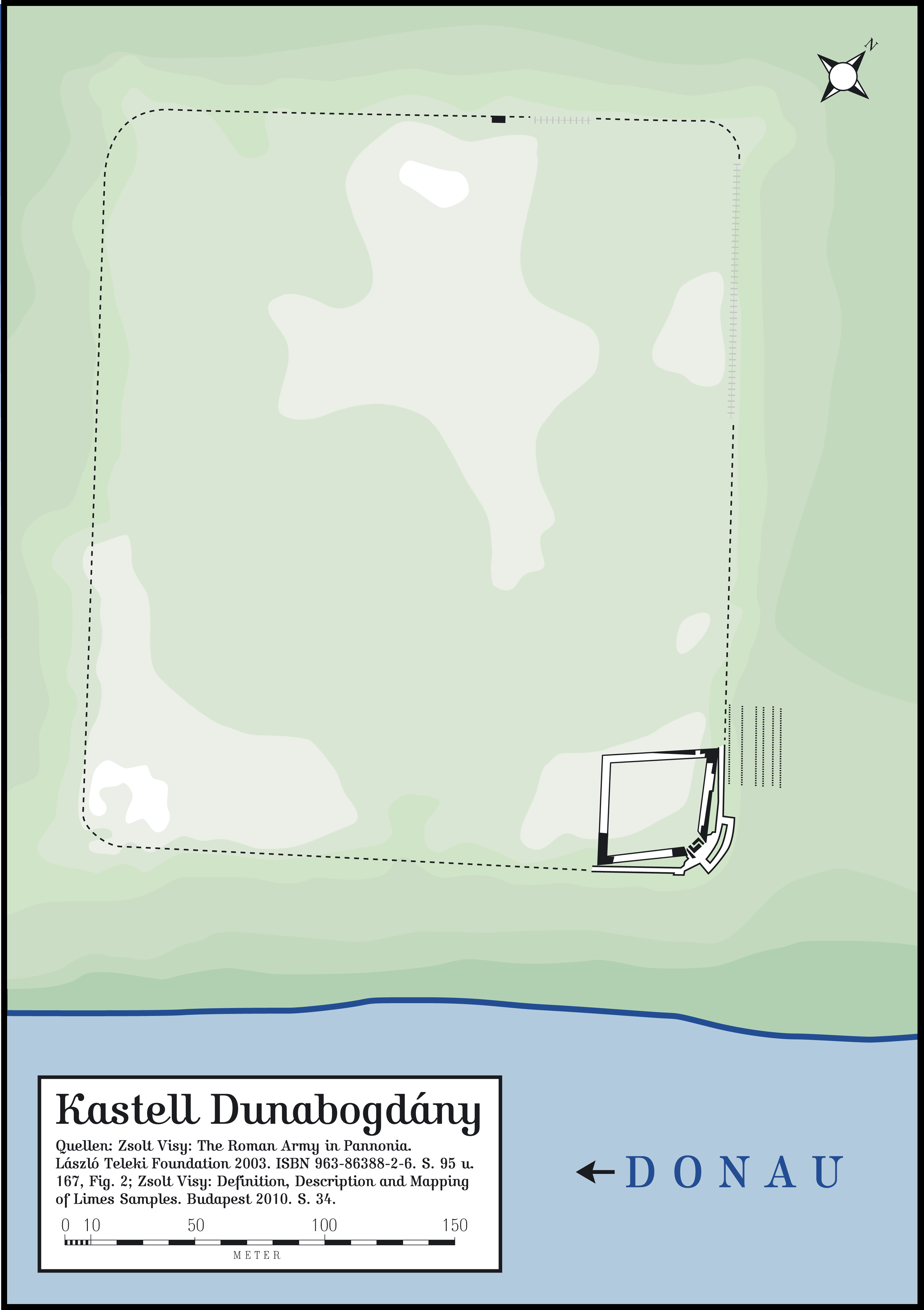 Das Kastell Dunabogdány, in der Antike Cirpi genannt, ist ein ehemaliges römisches Militärlager, das als Grenzbefestigung für die Bewachung eines Donauabschnitts des pannonischen Limes in Ungarn zuständig war.